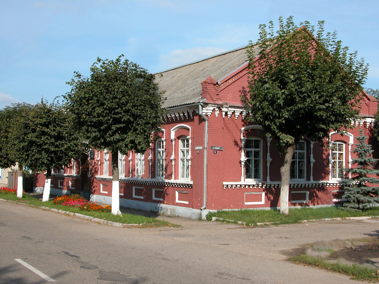 Верхнядзвінск музей